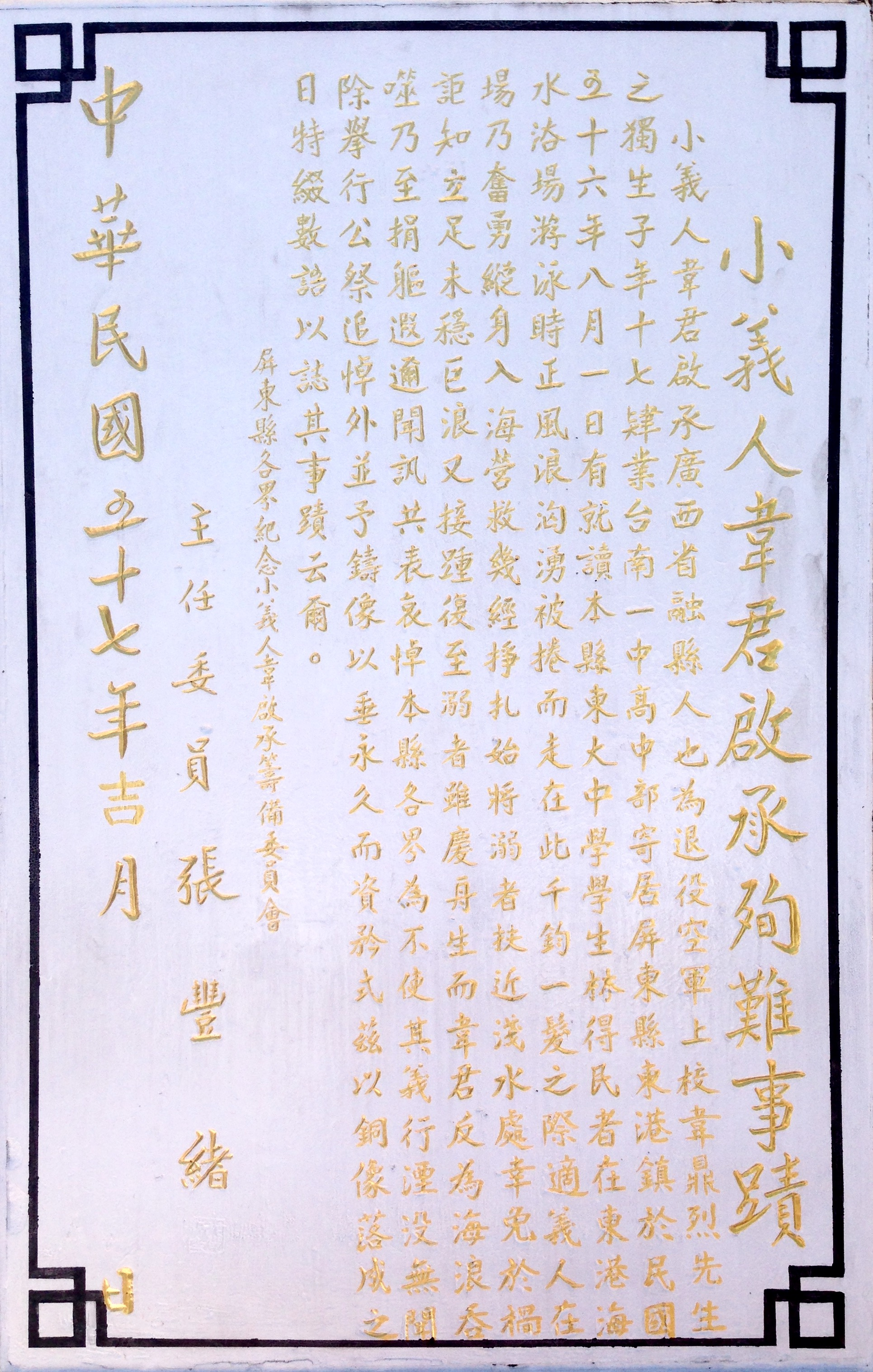 韋君啟銅像碑文